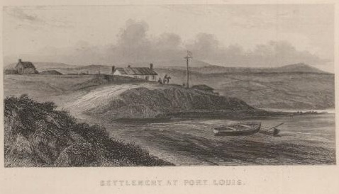 Casas de Puerto Soledad en Malvinas, 1833 en una litografía del libro de Darwin. El dibujante era Conrad Martens.